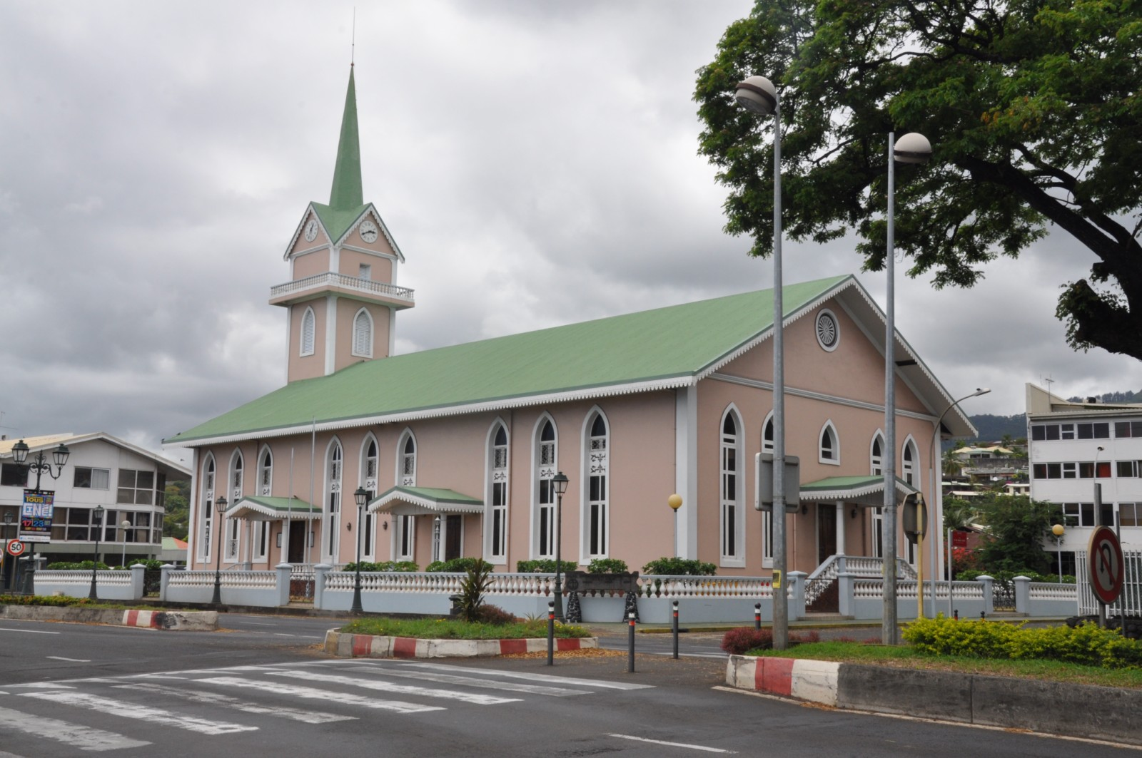 Temple de Paofai à Papeete